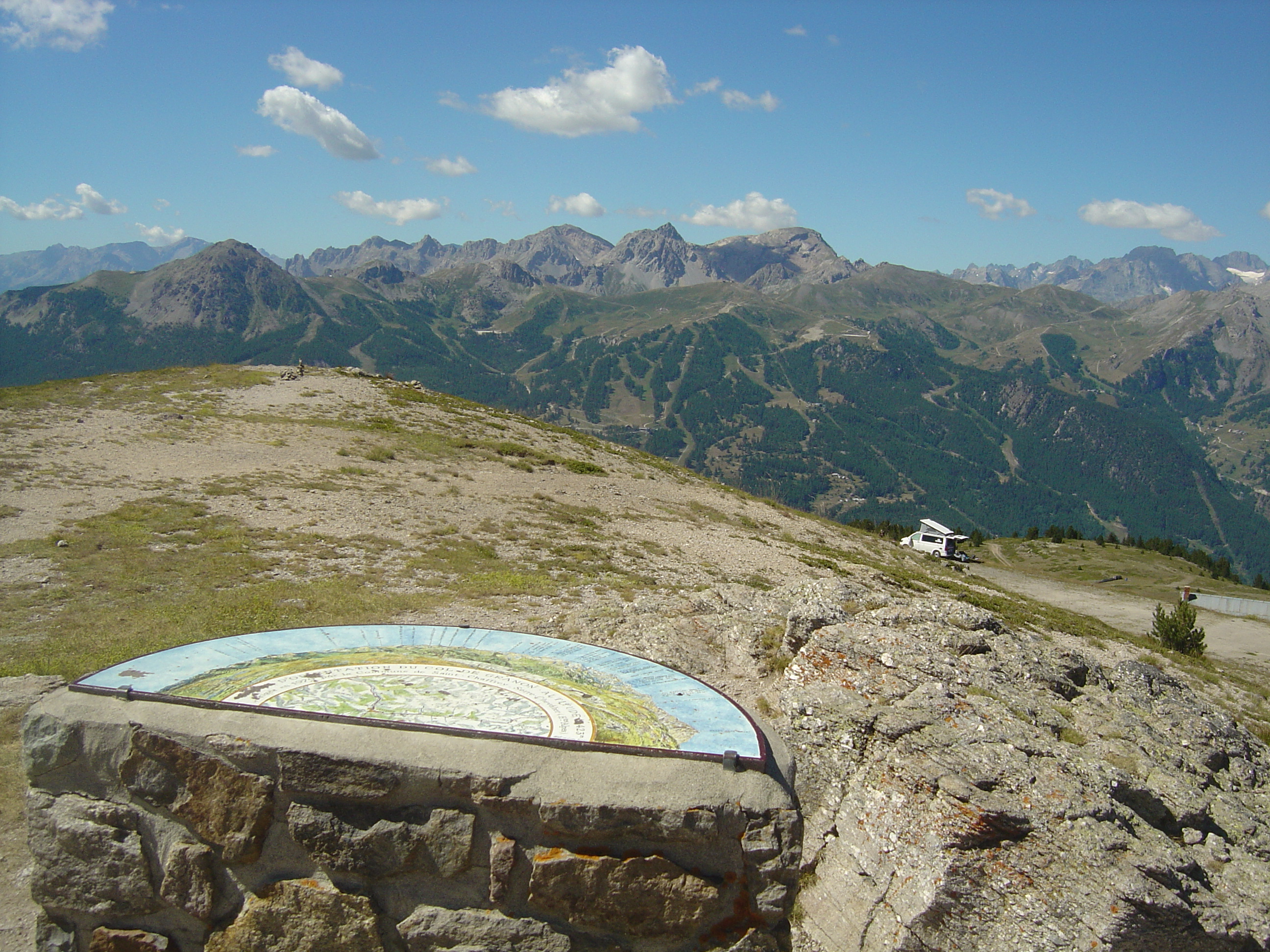 Table d'orientation (2413m) du col de Granon (2404m)